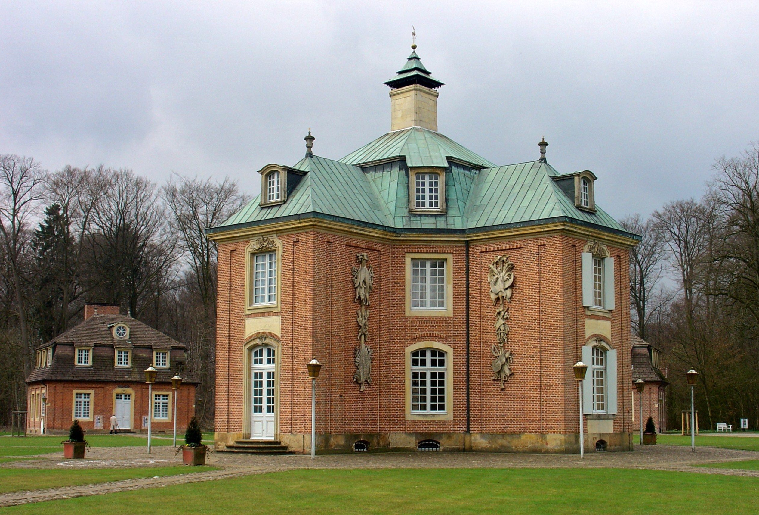 Schloss Clemenswerth - Südwest-Ansicht des Zentralbaus, im Hintergrund der Pavillon Münster